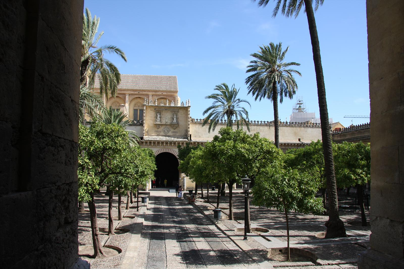 Patio de los Naranjos de la Mezquita de Córdoba, Córdoba (España). Al fondo la Puerta de las Palmas.